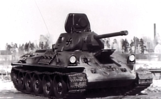 T-34 "Sotka"